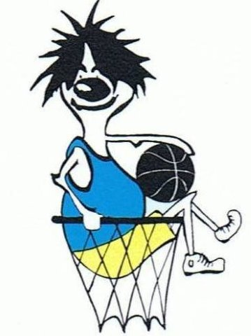 Logo BBC Kluisbergen